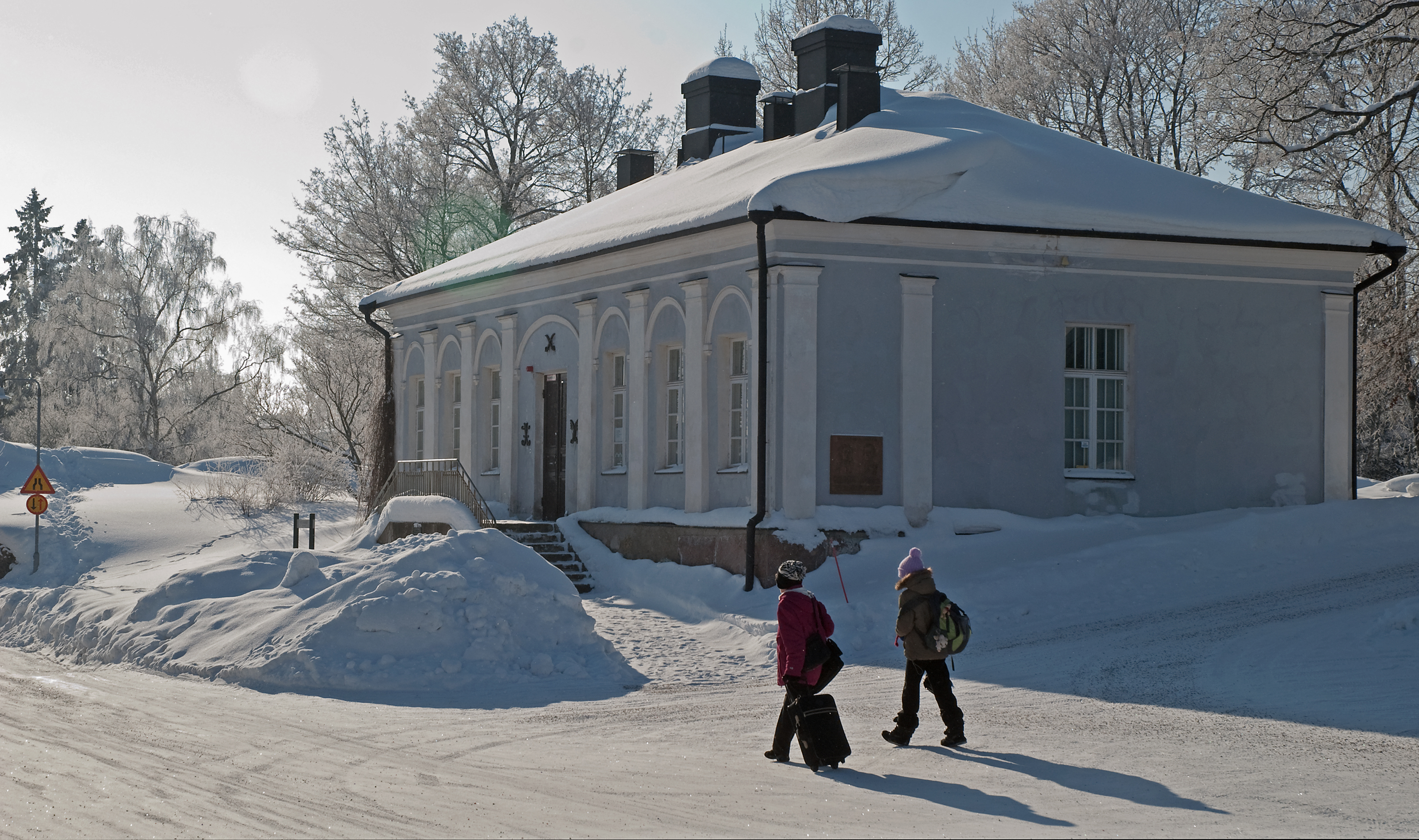 Ratsuväkimuseo, Lappeenranta. 2011.